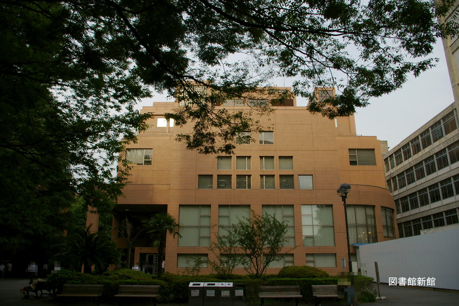 慶應義塾大学三田キャンパスにある附属図書館新館。